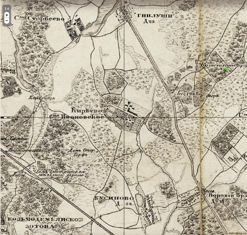 Район села Киреево в 1856 году